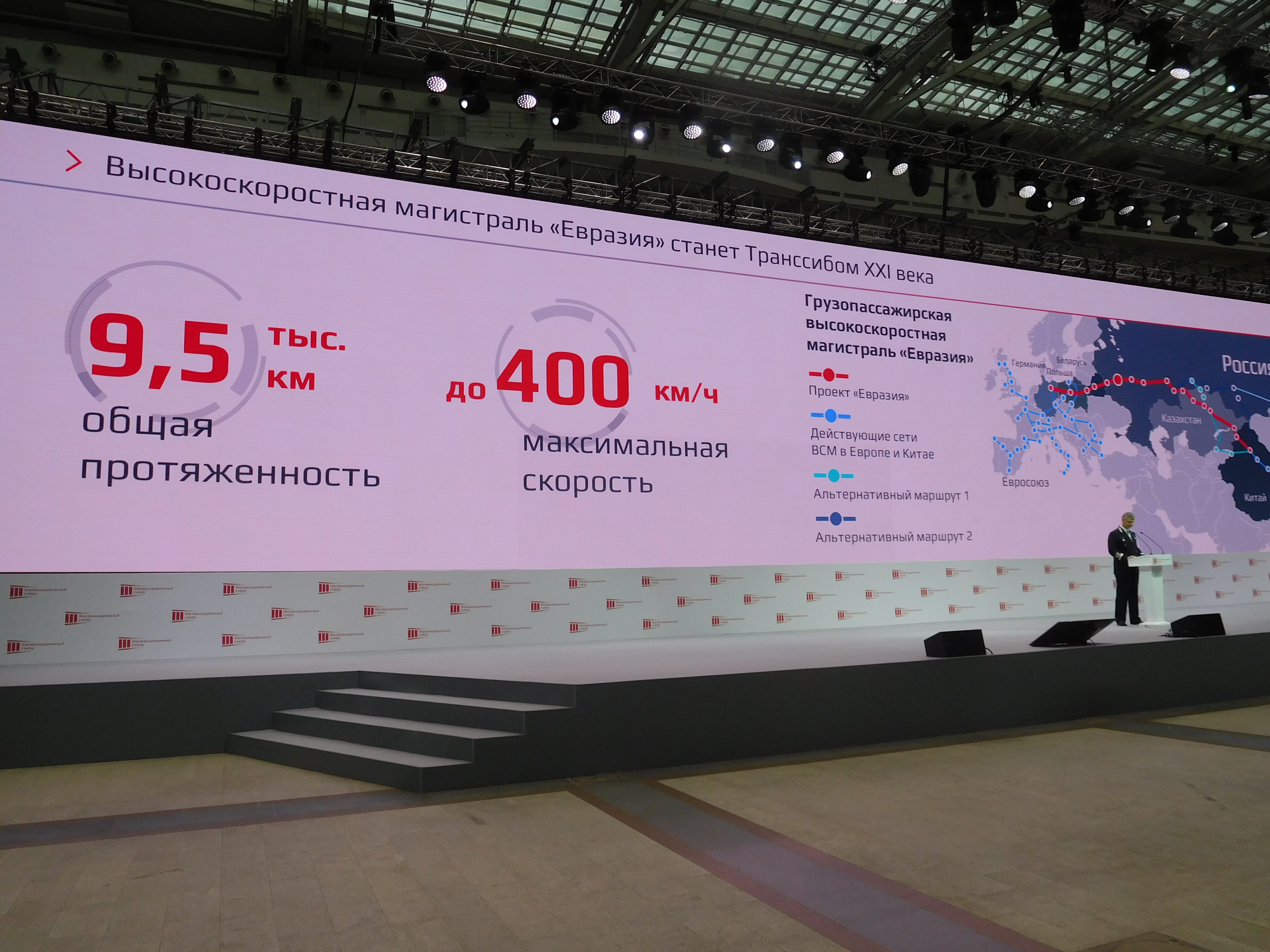 Выступление генерального директора – председателя правления ОАО «РЖД» Белозёрова О. В. «Ключевые итоги деятельности и инновационное развитие холдинга «РЖД».